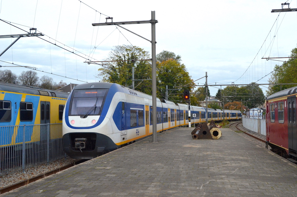 Nederlands Spoorwegmuseum treinstellen NS serie 2401-2469 op pendeldienst naar Utrecht Centraal. Foto: Erik Swierstra.